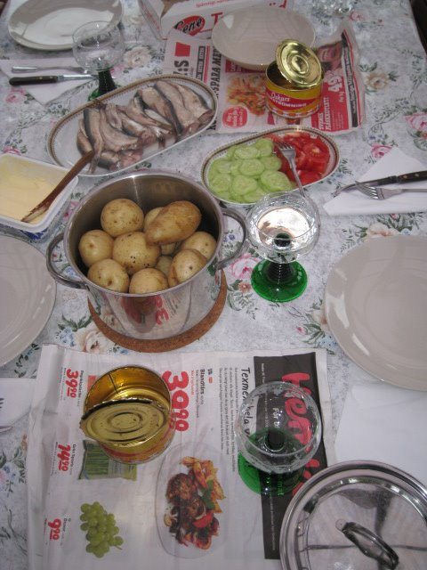 ett upplägg av attiraljer för en social sammankomst med surströmming som huvudpunkten.